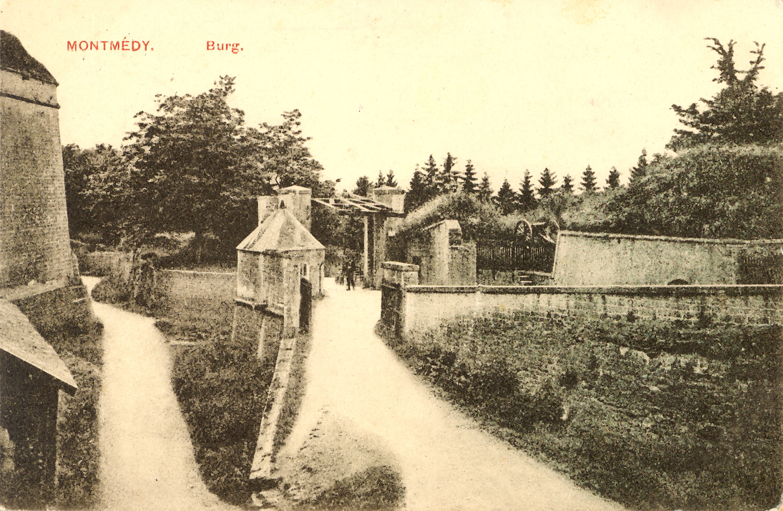 Postkarte "MONTMEDY Burg" aus dem Jahr 1914 (aus den "Kriegs-Erinnerungen 1914" eines Kriegsteilnehmers)